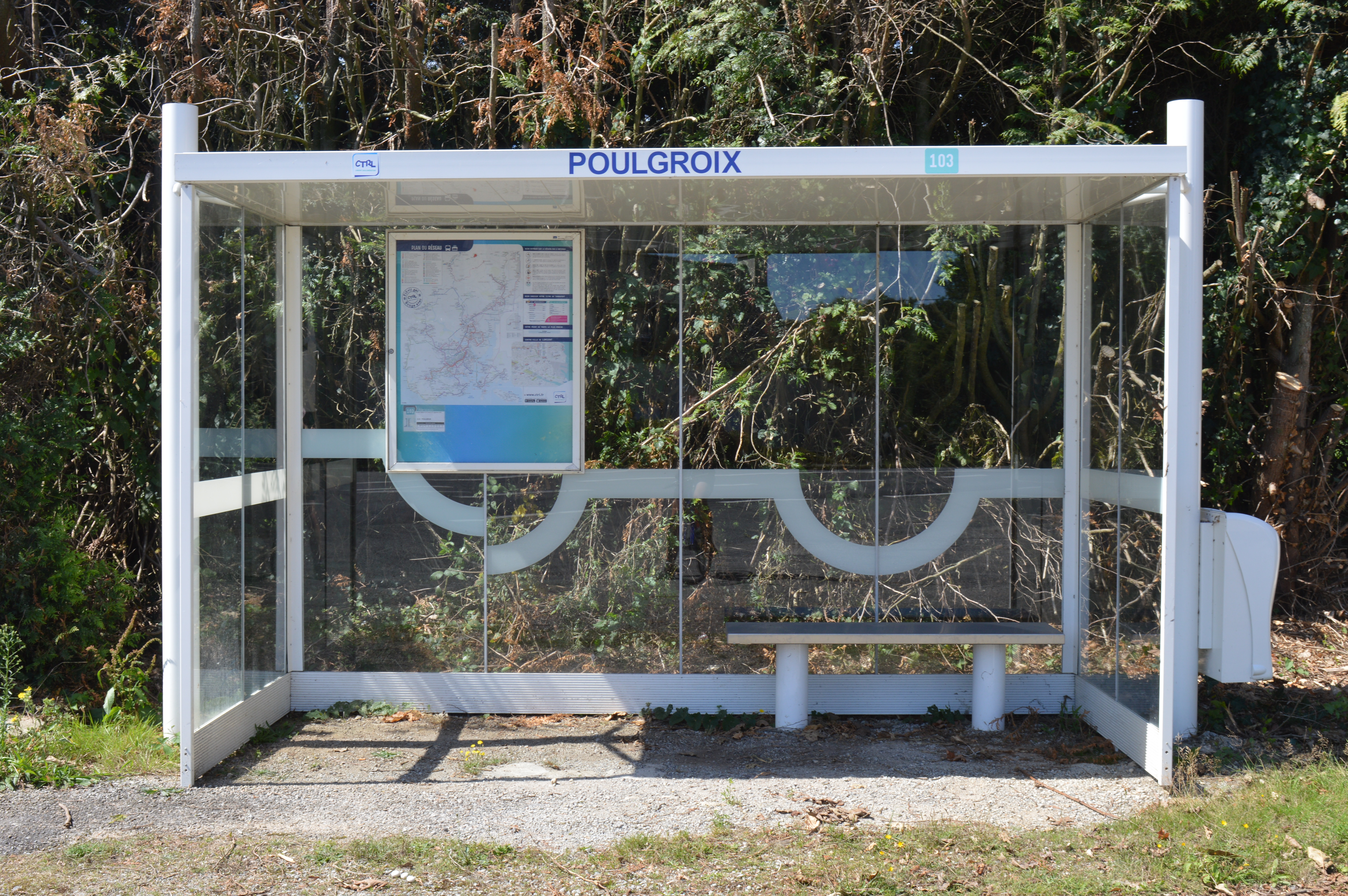 Arrêt de bus mise en place à Poulgroix par la Compagnie de transport de la région lorientaise